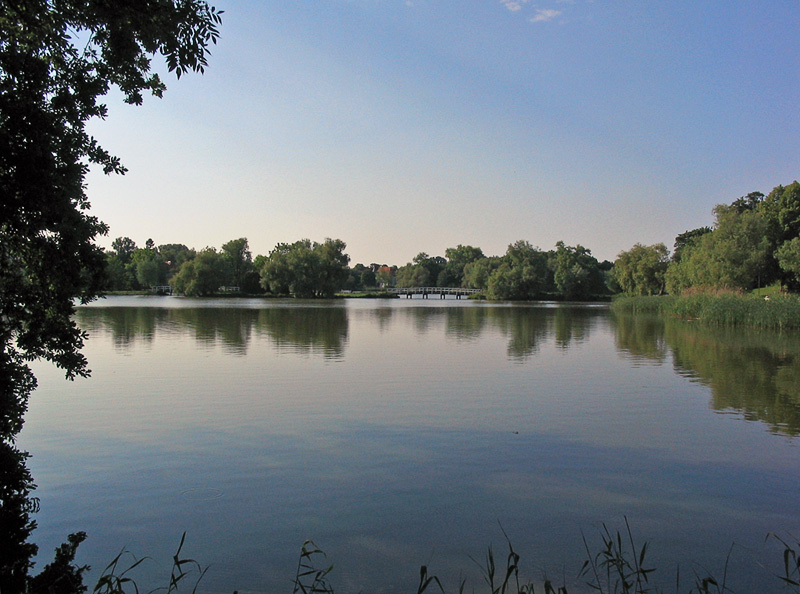 Beschreibung: Blick über den Knieperteich mit den Weißen Brücken in Stralsund Fotograf: Darkone, 15. Juni 2005